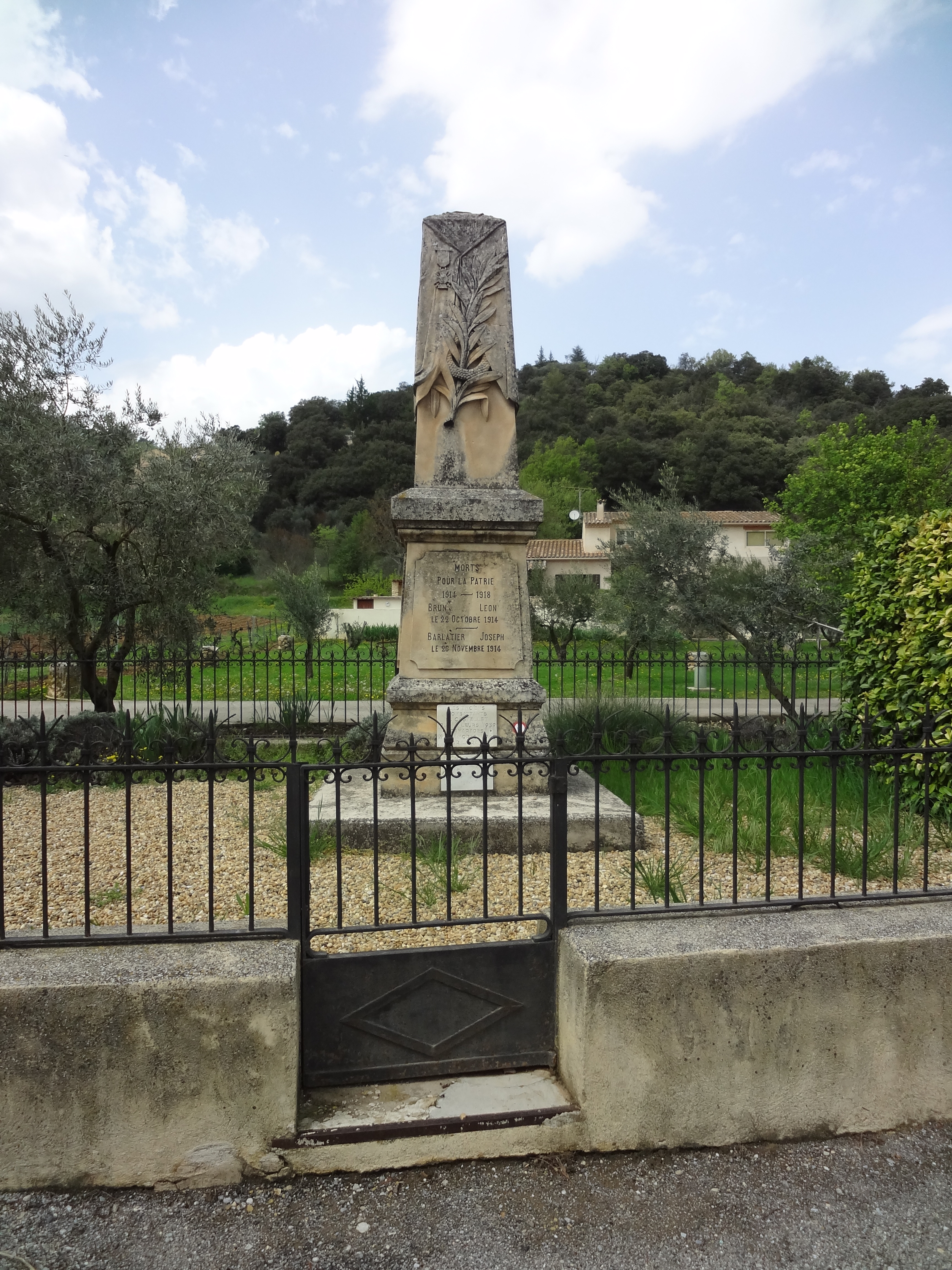 Monument aux morts du Castellet (les morts sont inscrits par année, une année par face du monument)